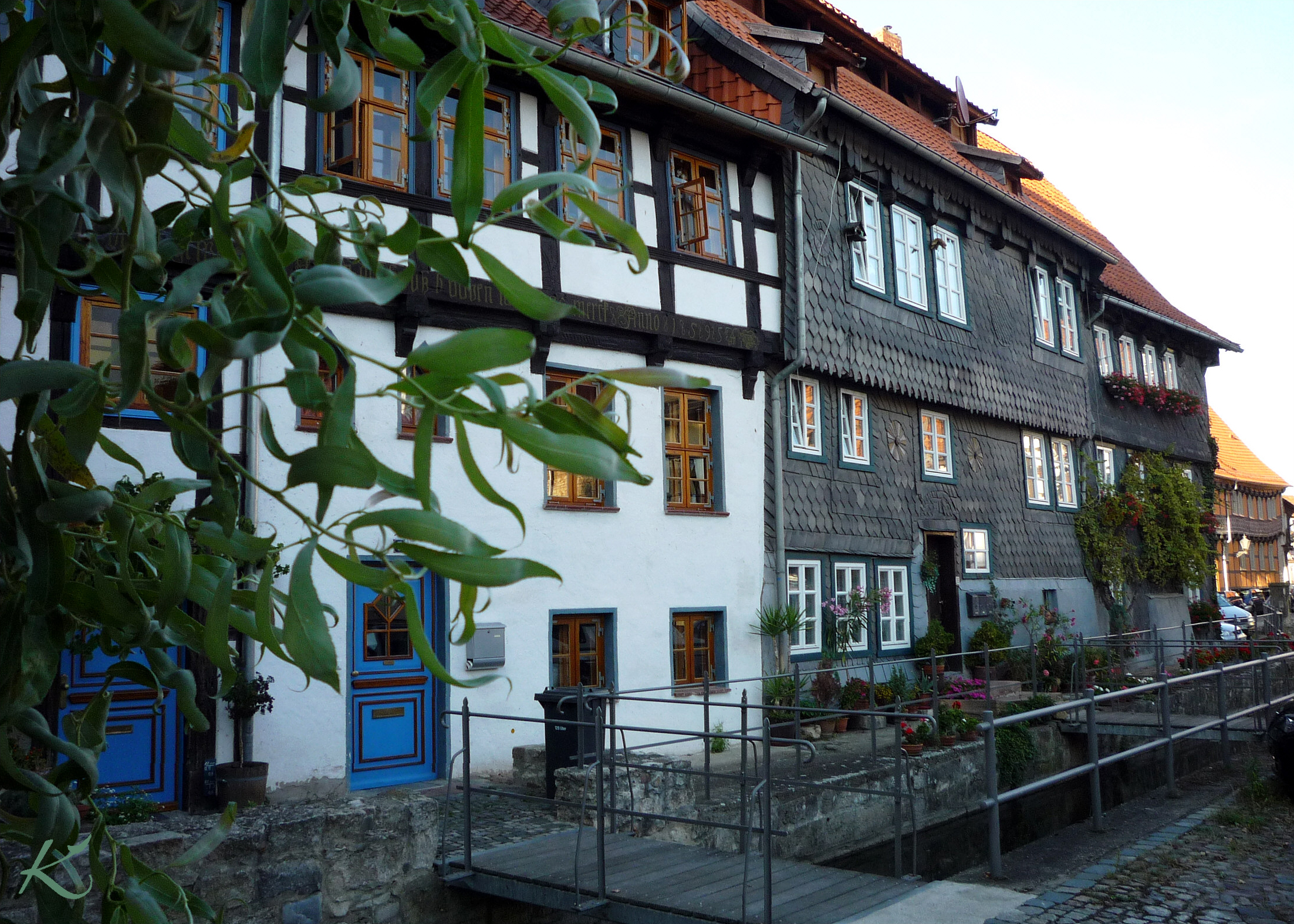 Ein Ensemble historischer Wohnhäuser am Vogteiplatz von Osterwieck. Vorgelagert ein Nebenarm des Flüßchens Ilse. Hauszugang nur über Brücken.